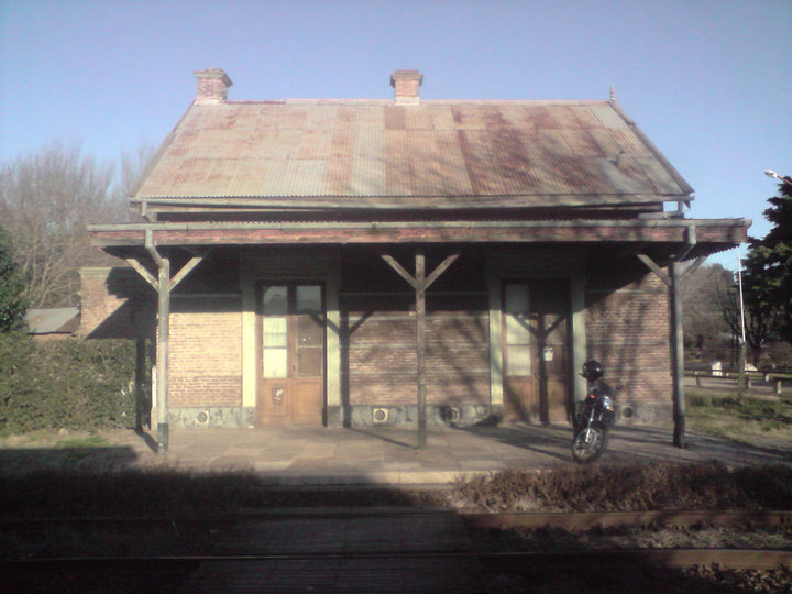 Estacion Goldney